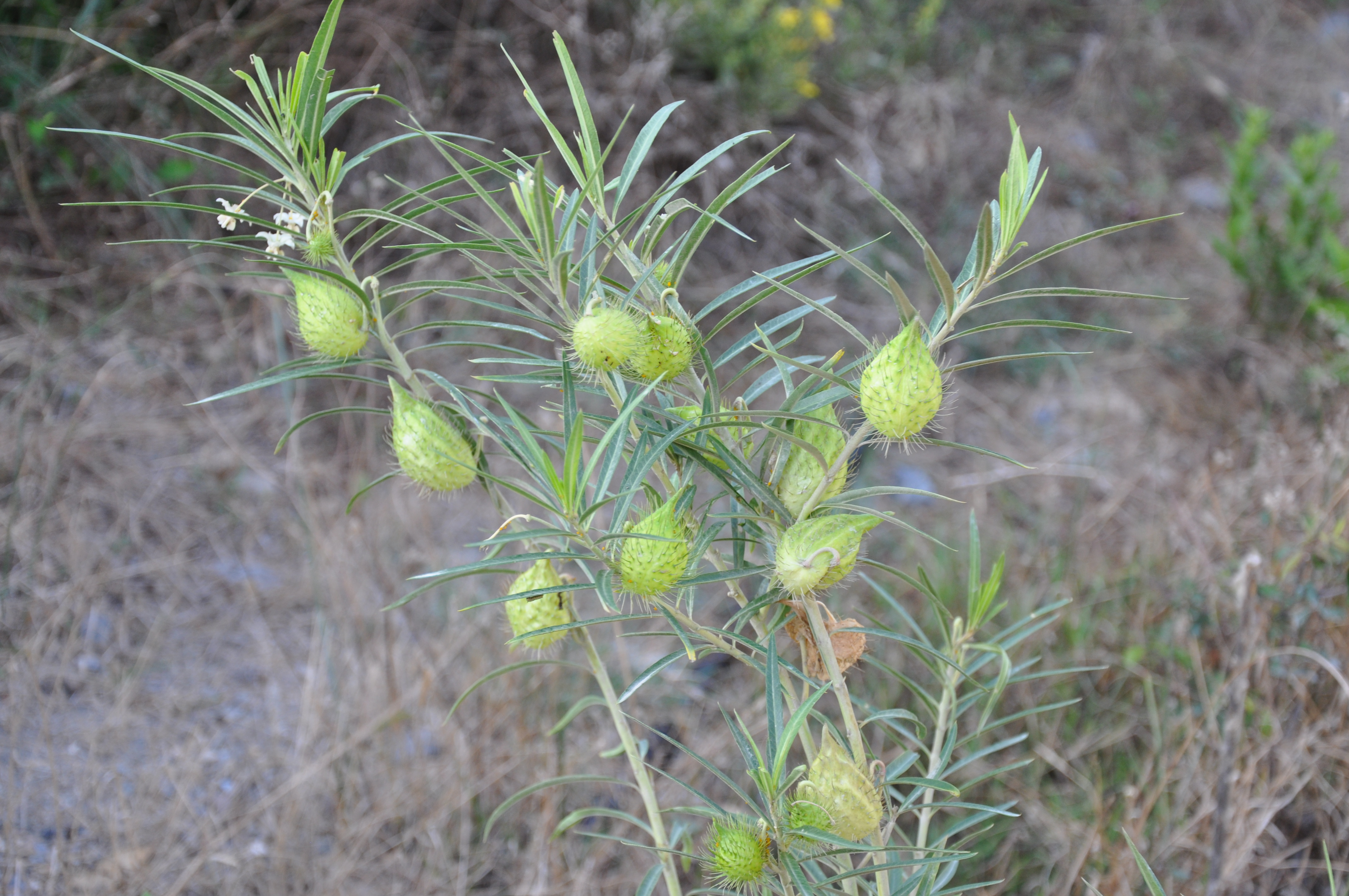 Árbol de la seda (Gomphocarpus fruticosus) Ceuta, España.